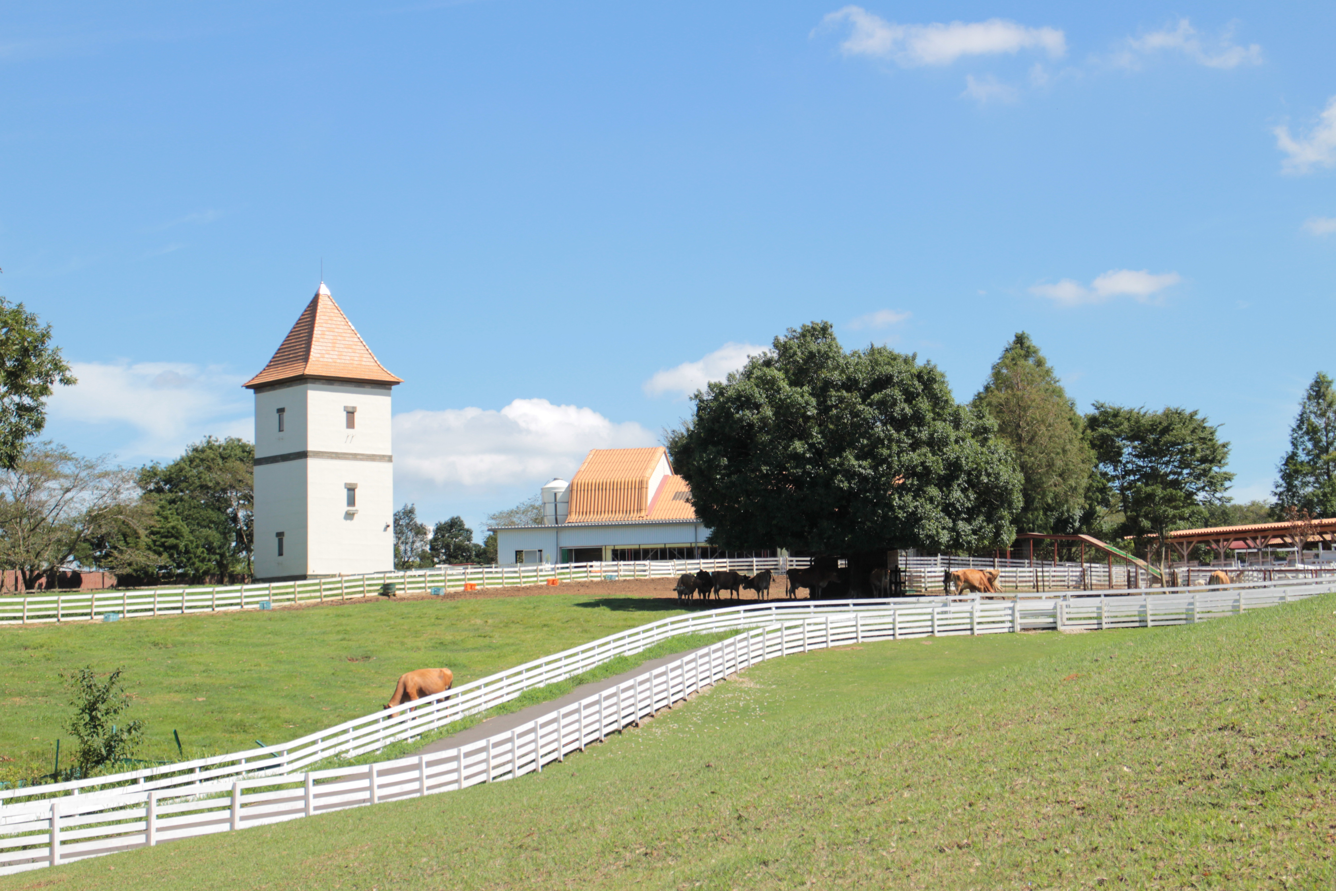 園内風景